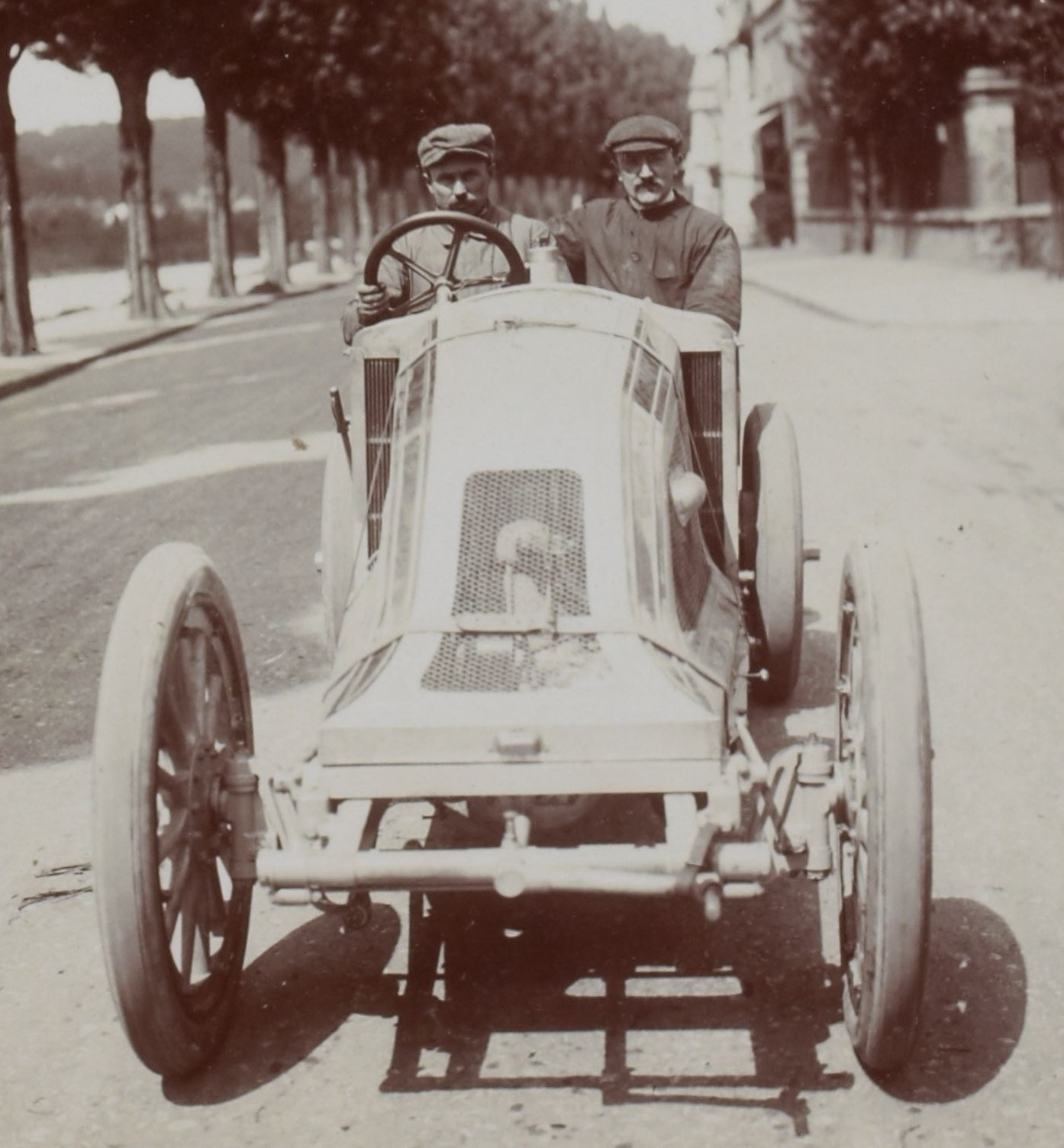 [Collection Jules Beau. Photographie sportive] : T. 34. AnnÃ©es 1907 et 1908 / Jules Beau : F. 47v. [Grand Prix de l\' A. C. F. [Automobile Club de France], 7 juillet 1908]